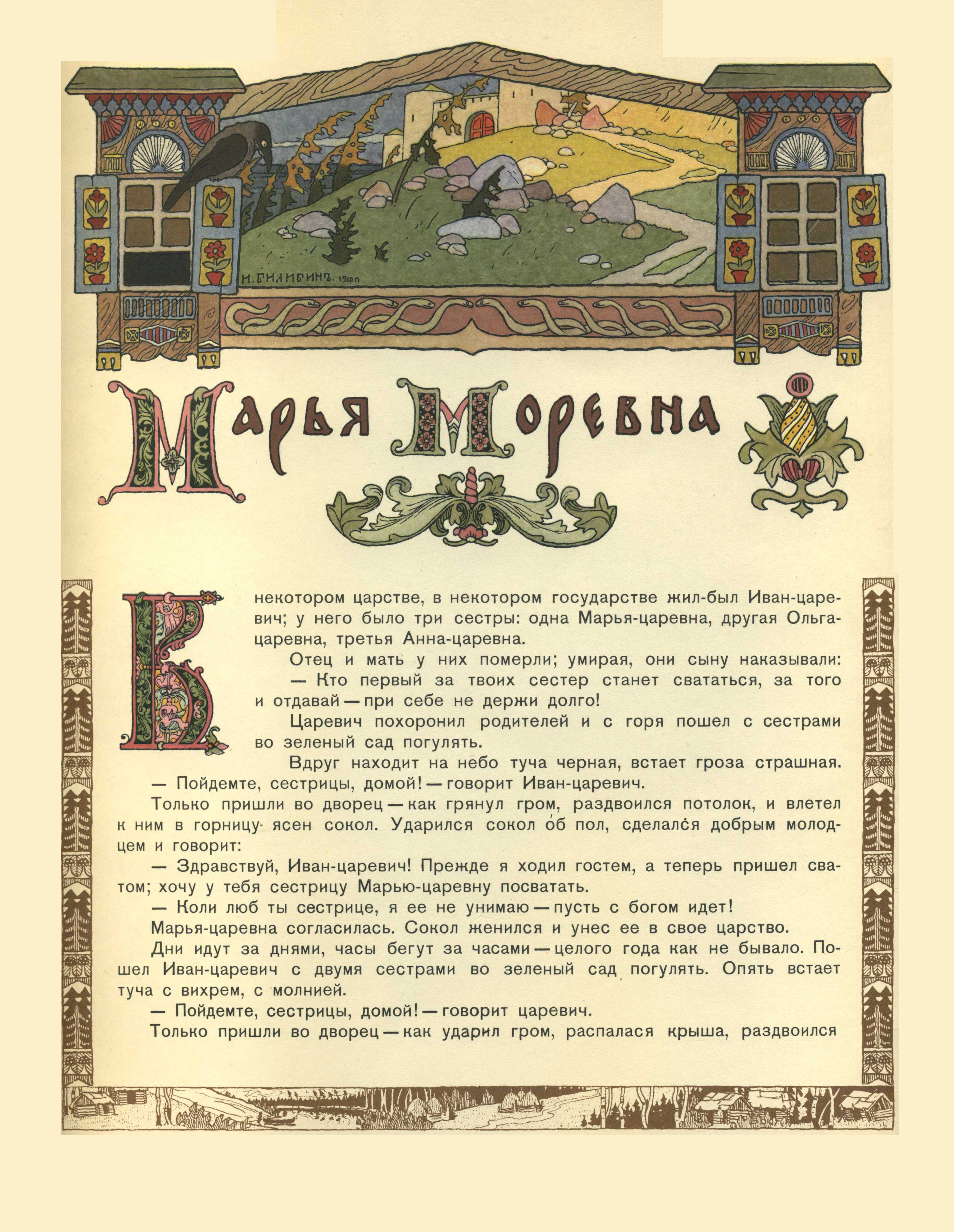 Произведение Ивана Билибина